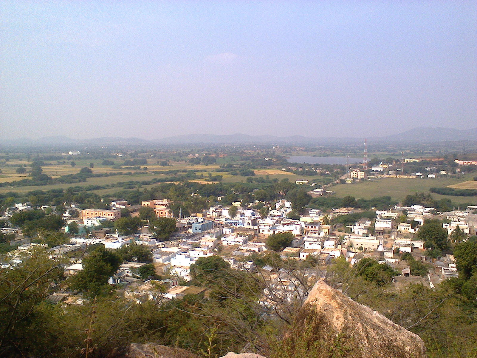 పానగల్ పరిదృశ్యం